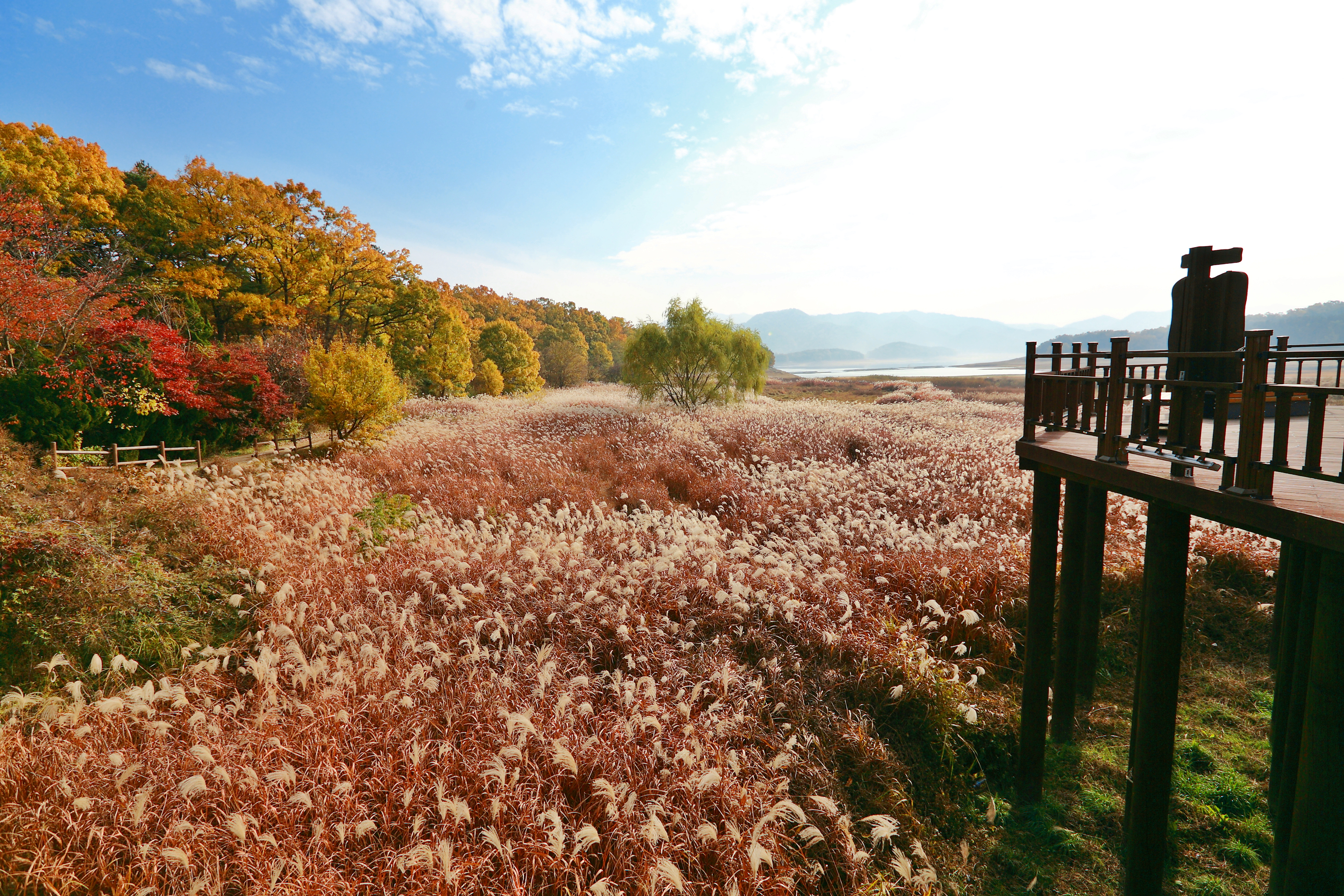 대청호오백리길 4구간_4